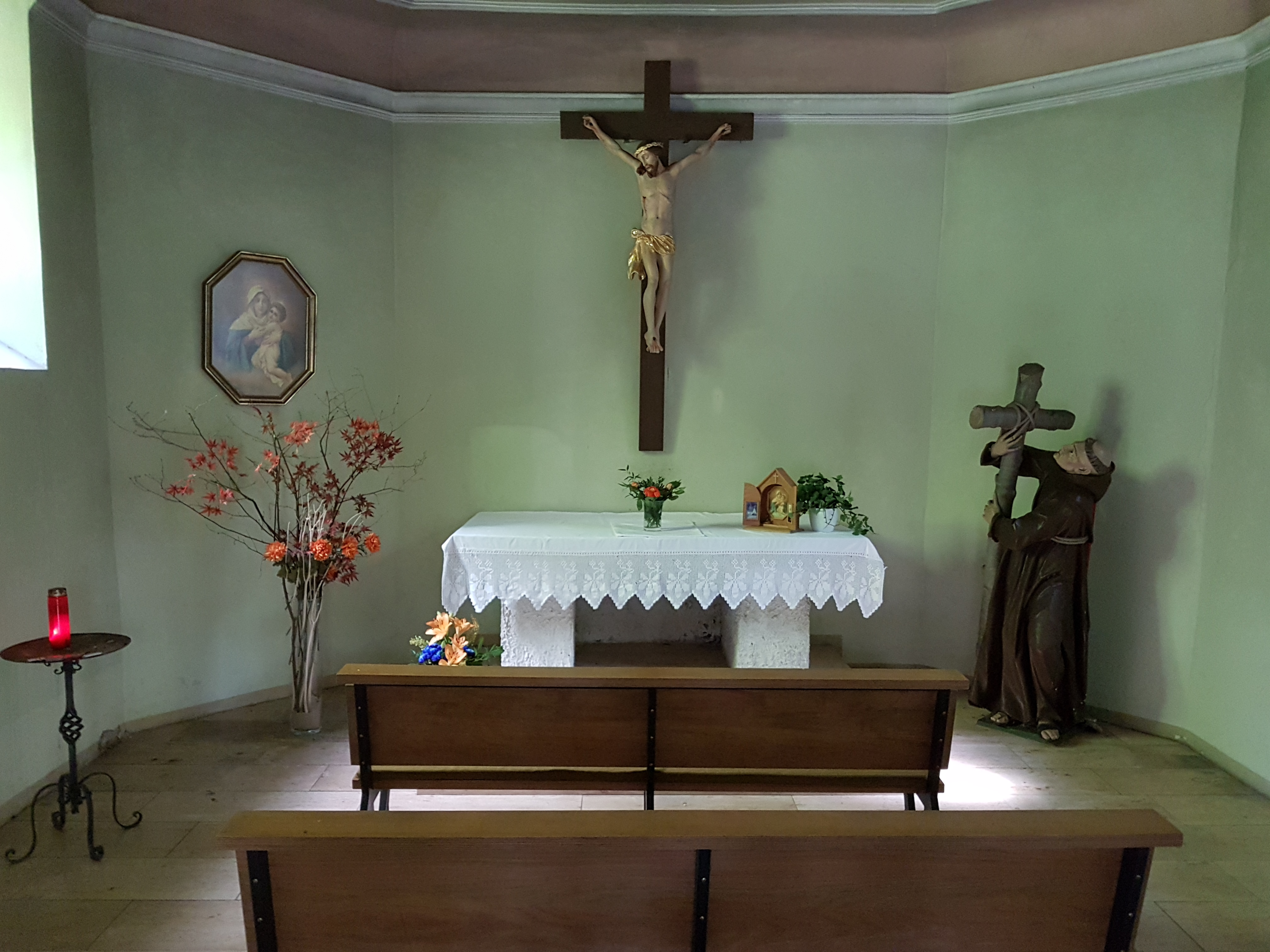 Die 12. Kapelle des Dittwarer Kreuzweges wurde „Kalvarienberg“ genannt, da sie größer als die Übrigen war und sich in der „Kalvarienbergkapelle“ ein Altar zur Erinnerung an die Kreuzigung befand. Von der ersten Station bis zum Kalvarienberg zählte man 1361 Schritte; Das soll laut Legende der Abstand des historischen Kreuzweges in Jerusalem sein. Im ersten Dittwarer Wallfahrtsbüchlein wurden auch eine ganze Reihe von weiteren Wundern aufgezählt, die sich im Jahre 1670 ereignet haben sollen. Ursprünglich handelte es sich beim Dittwarer Kalvarienbergkapelle um eine Behausung der Einsiedler. Diese wurde aber von einem Freiherrn Bettendorff zu Gissigheim zu einem weiteren Kapellchen (neben der eigentlichen Kreuzkapelle) umgebaut.